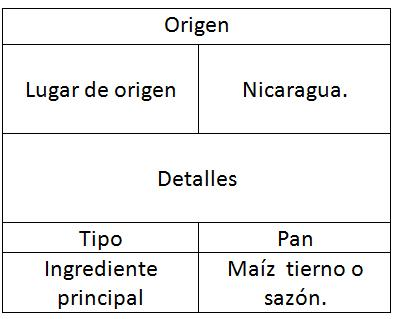 Tabla característica de la guirila.